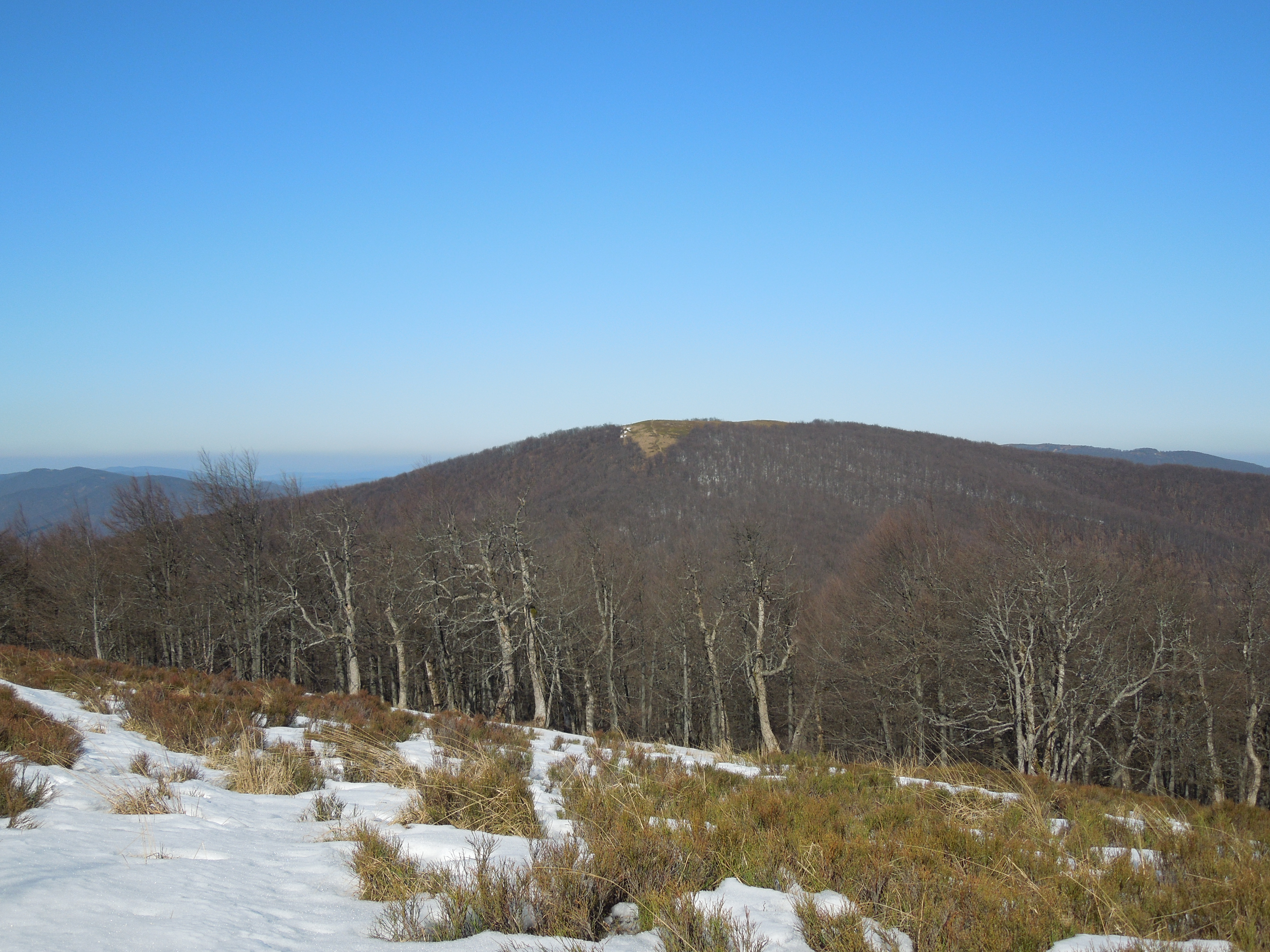 Pohľad na Pľašu z turistického chodníka smerujúceho od Ďurkovca